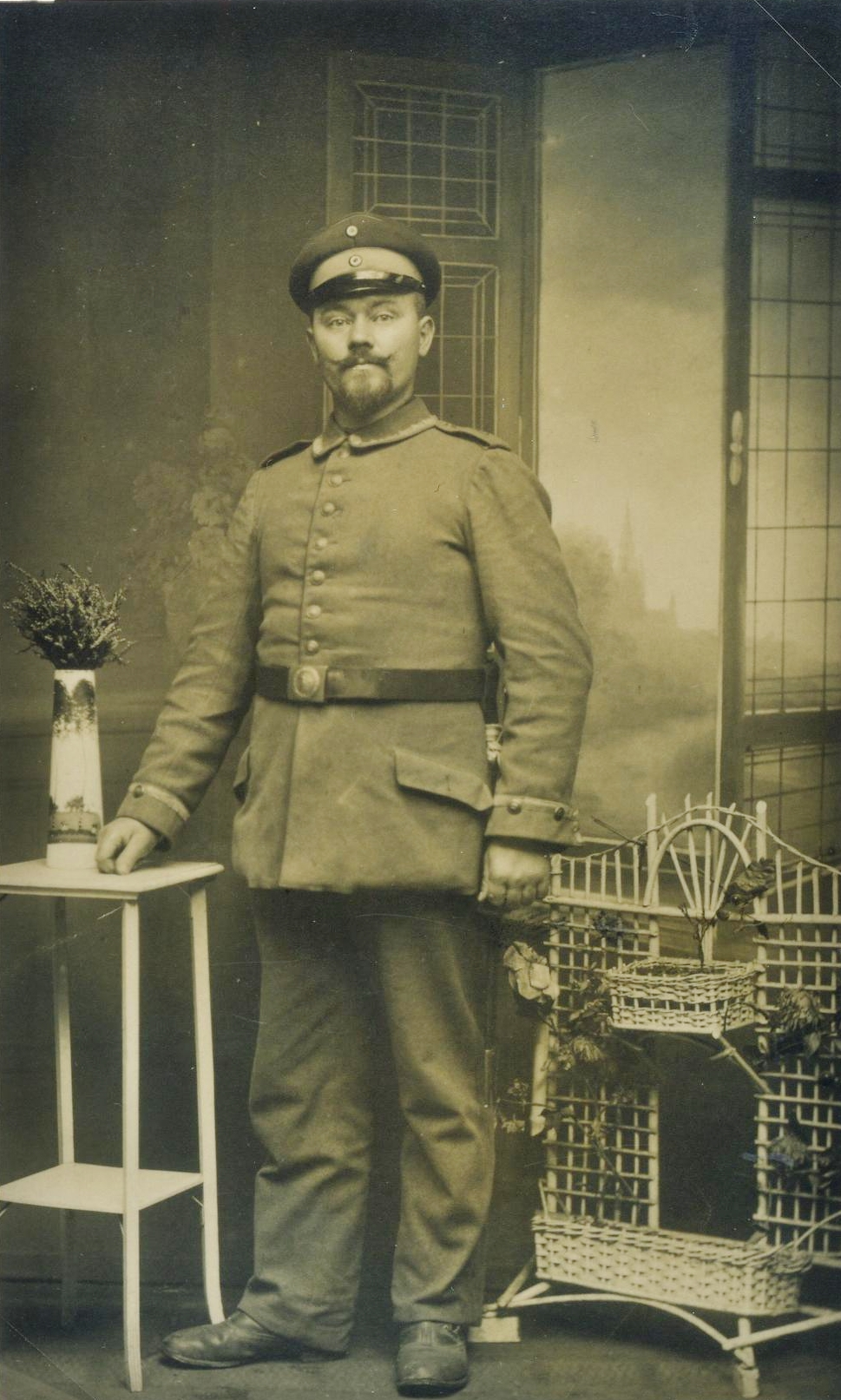 Wilhelm Winzer als Soldat im Ersten Weltkrieg